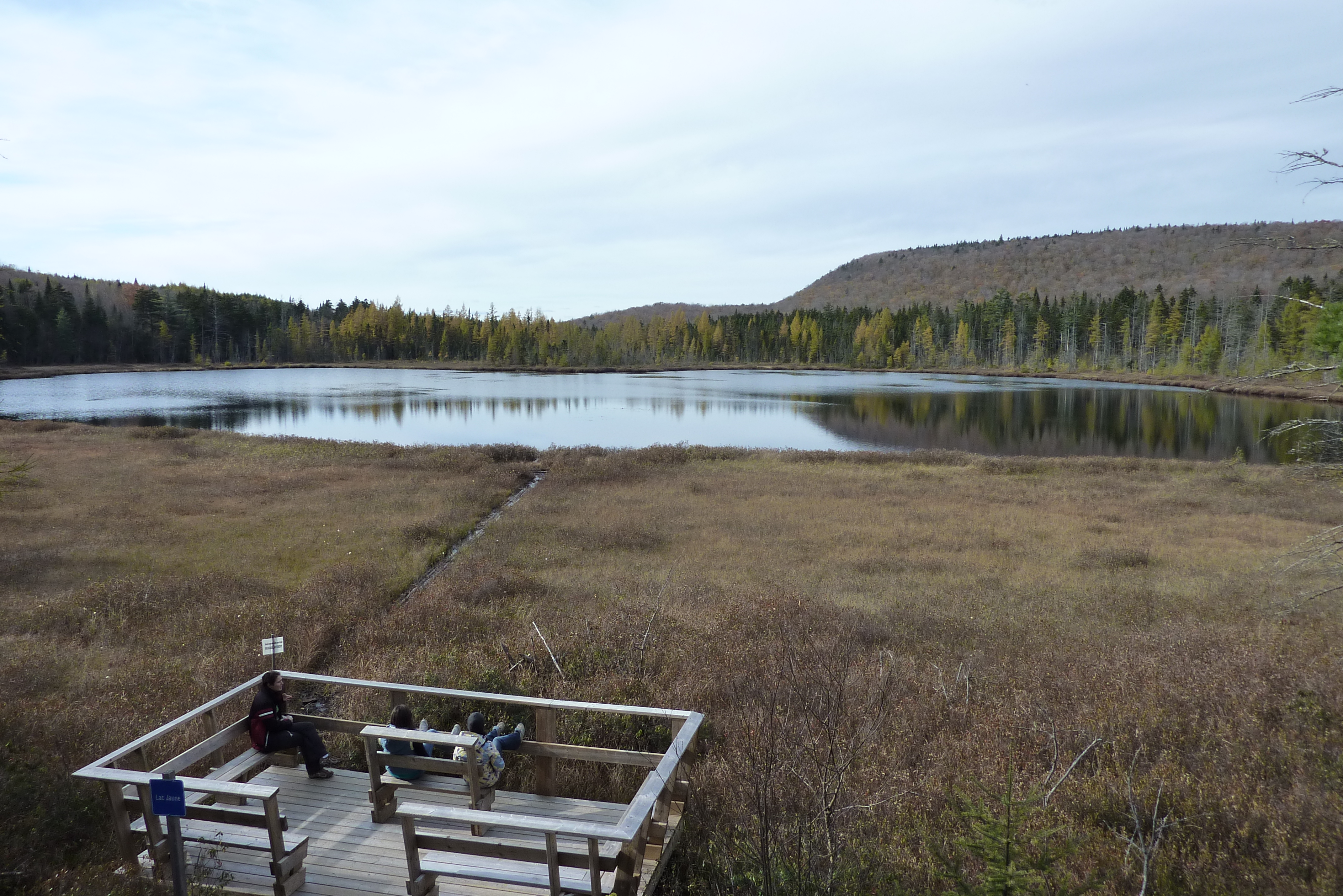 Lac Jaune, à Sainte-Catherine-de-la-Jacques-Cartier.